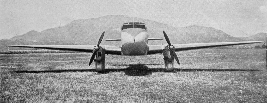 letecký motor Walter Major 6 a letoun Caproni Ca.308 Borea